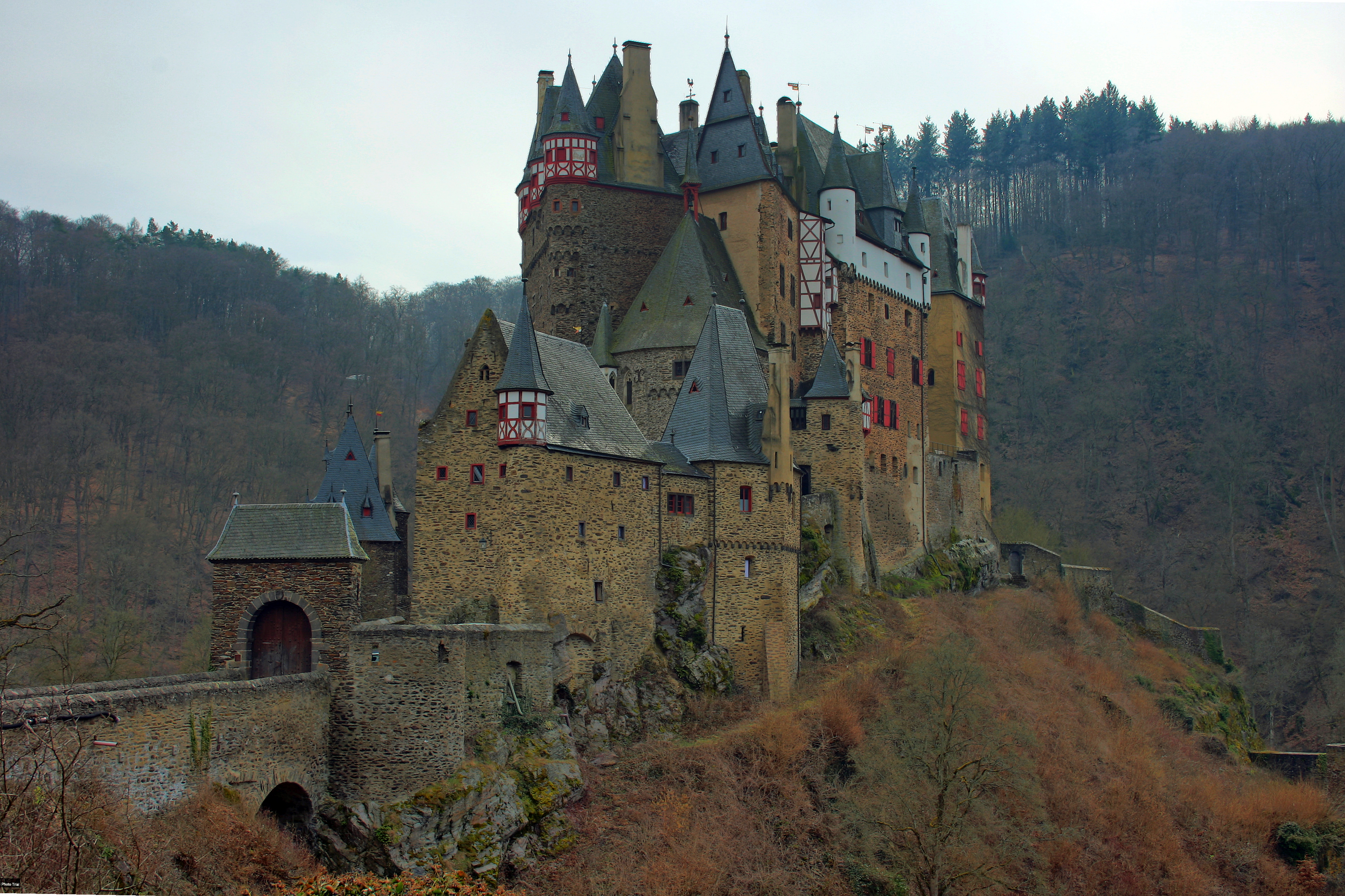 Burg Eltz, südlich von Mayen gelegen im Elztal.